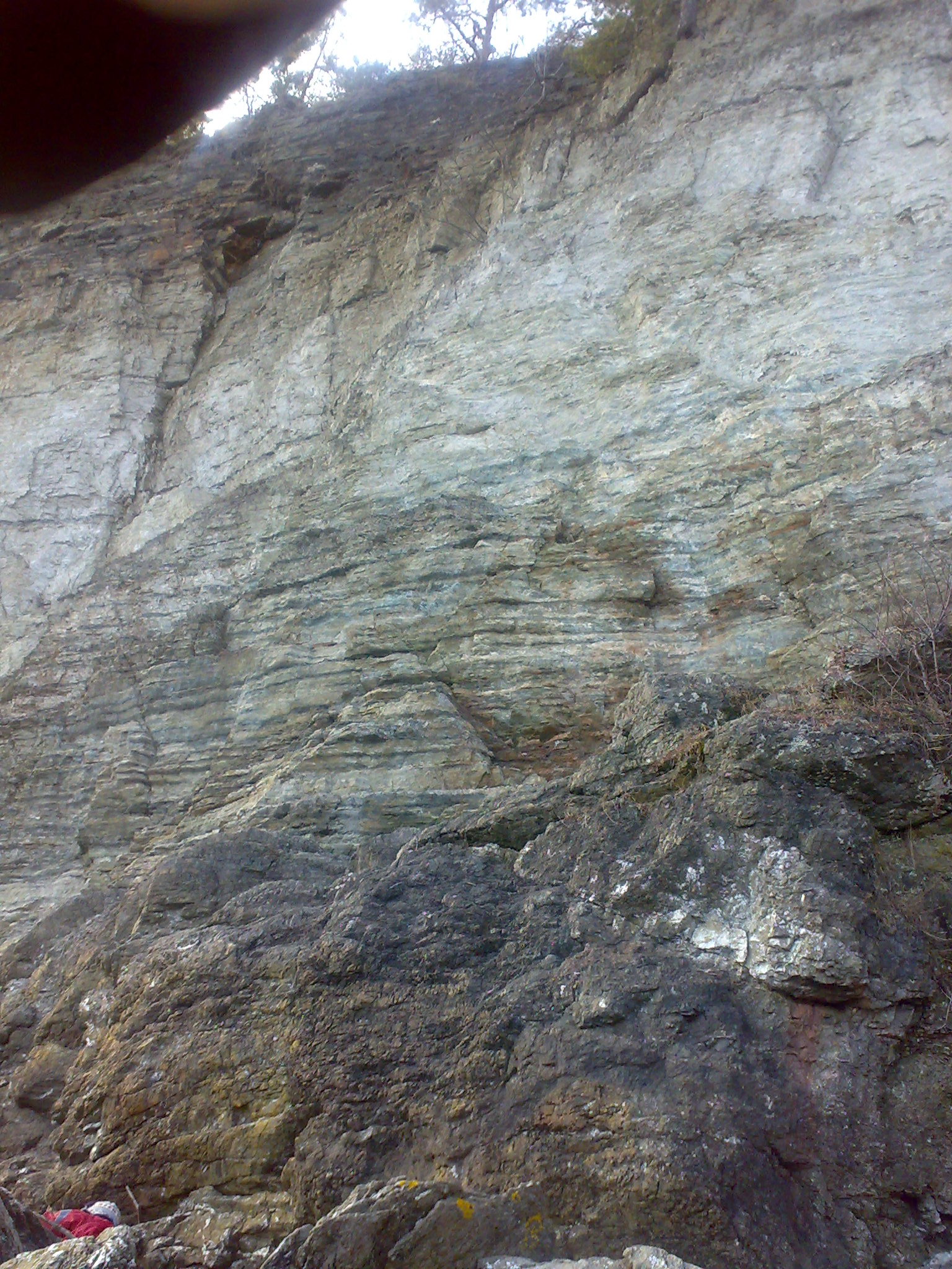 Ersvika, Norway, Upper Ordovicium